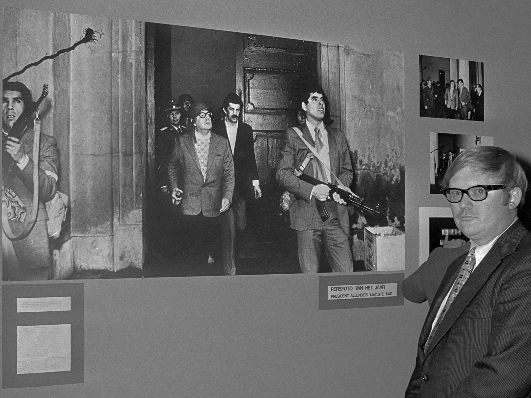 World Press Photo in Van Goghmuseum ; Dane Bath ( New York Times ) bij winnende foto die hij verspreid heeft 29 maart 1974